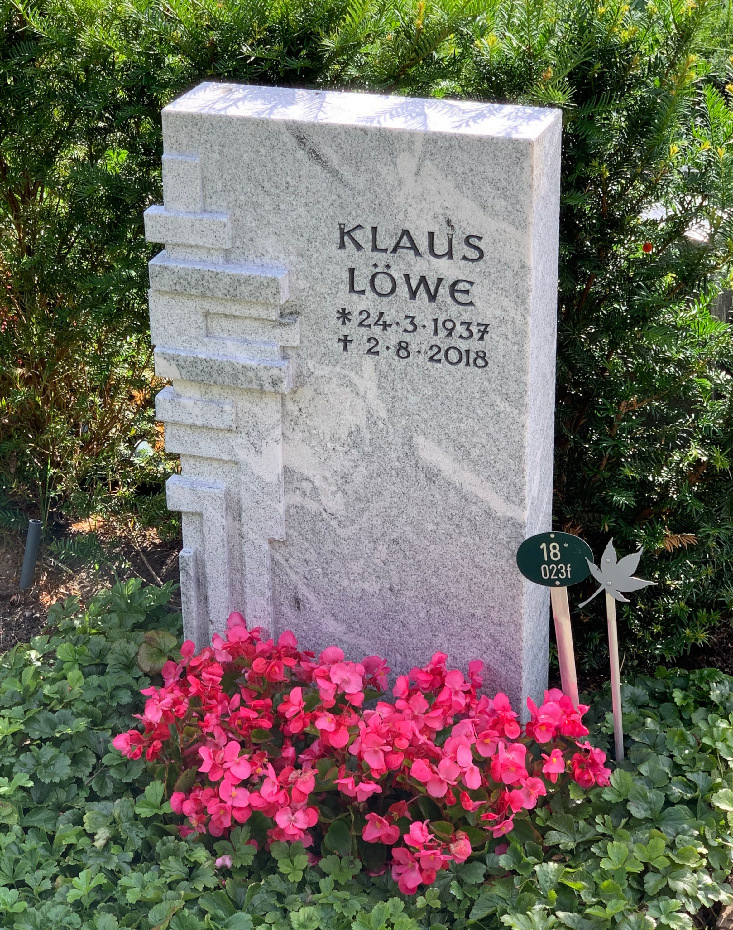 Grabstein Klaus Löwe auf dem Rahlstedter Friedhof. Ornament der Altarstele in der Matthias-Claudius-Kirche Oldenfelde nachempfunden. Ausführung: Steinmetzbetrieb J. Degen GmbH, Hamburg.